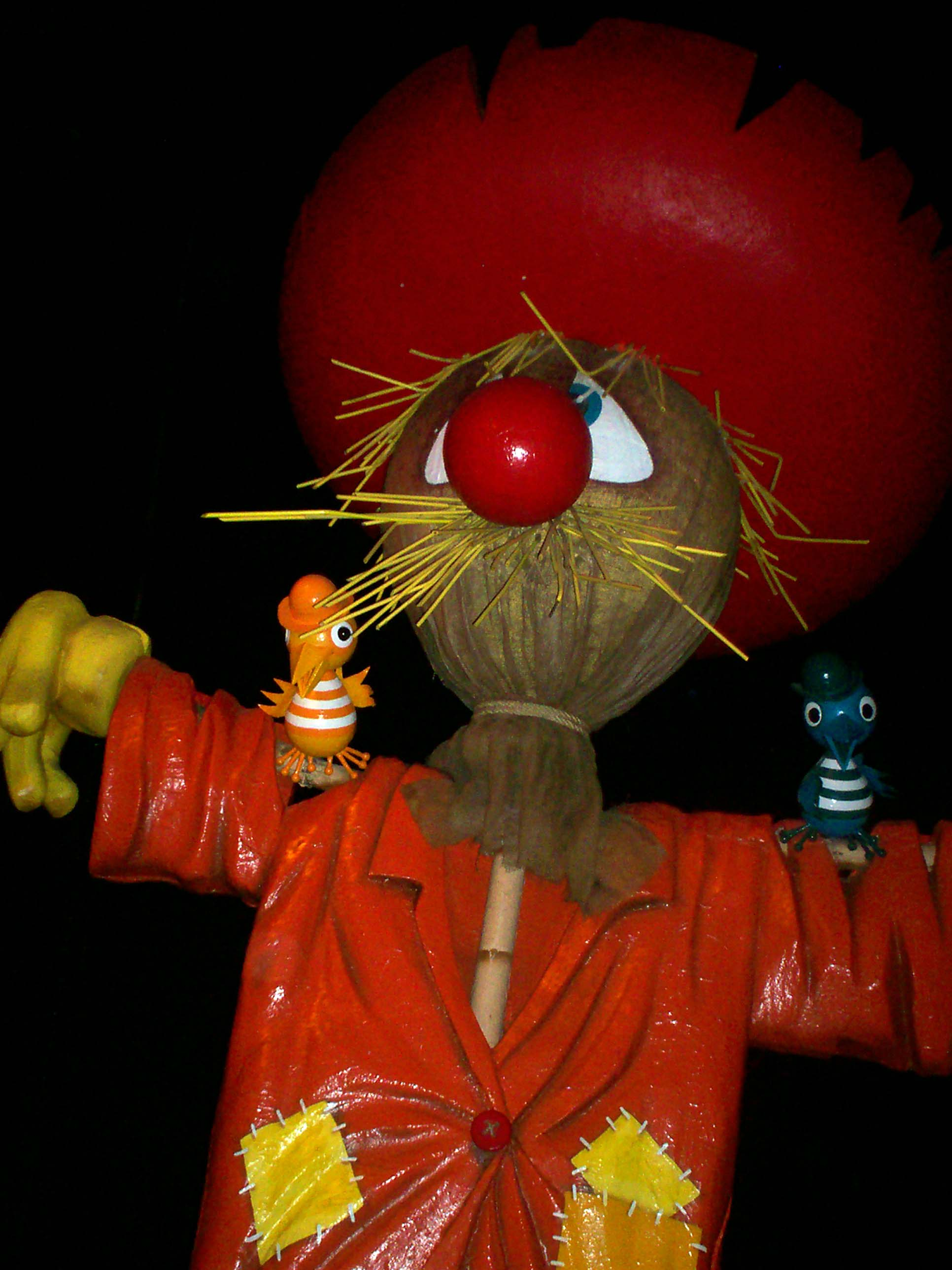 Vogelverschrikker Nederland Carnaval Festival